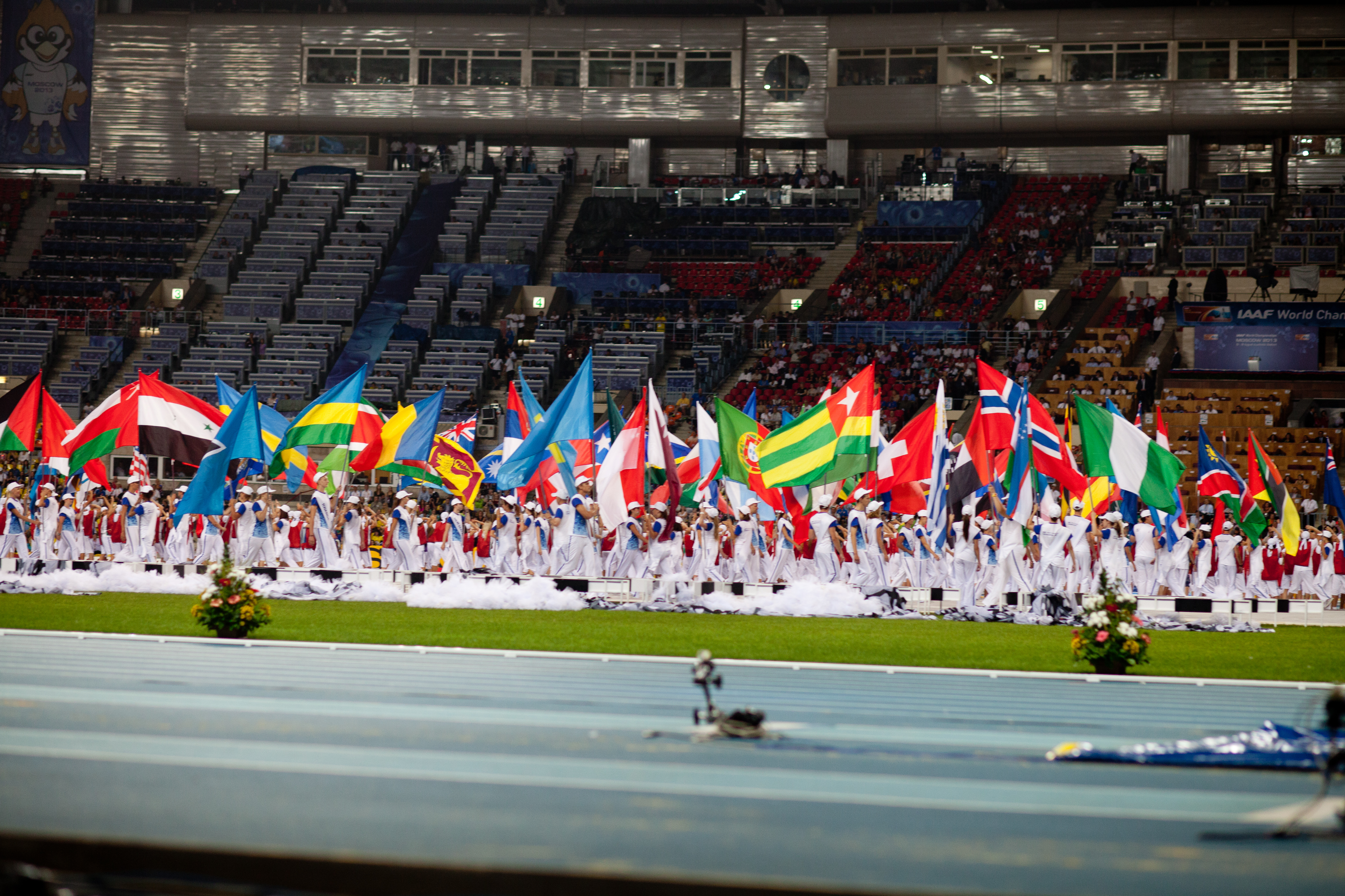 Первый день Чемпионата мира по легкой атлетике в Москве